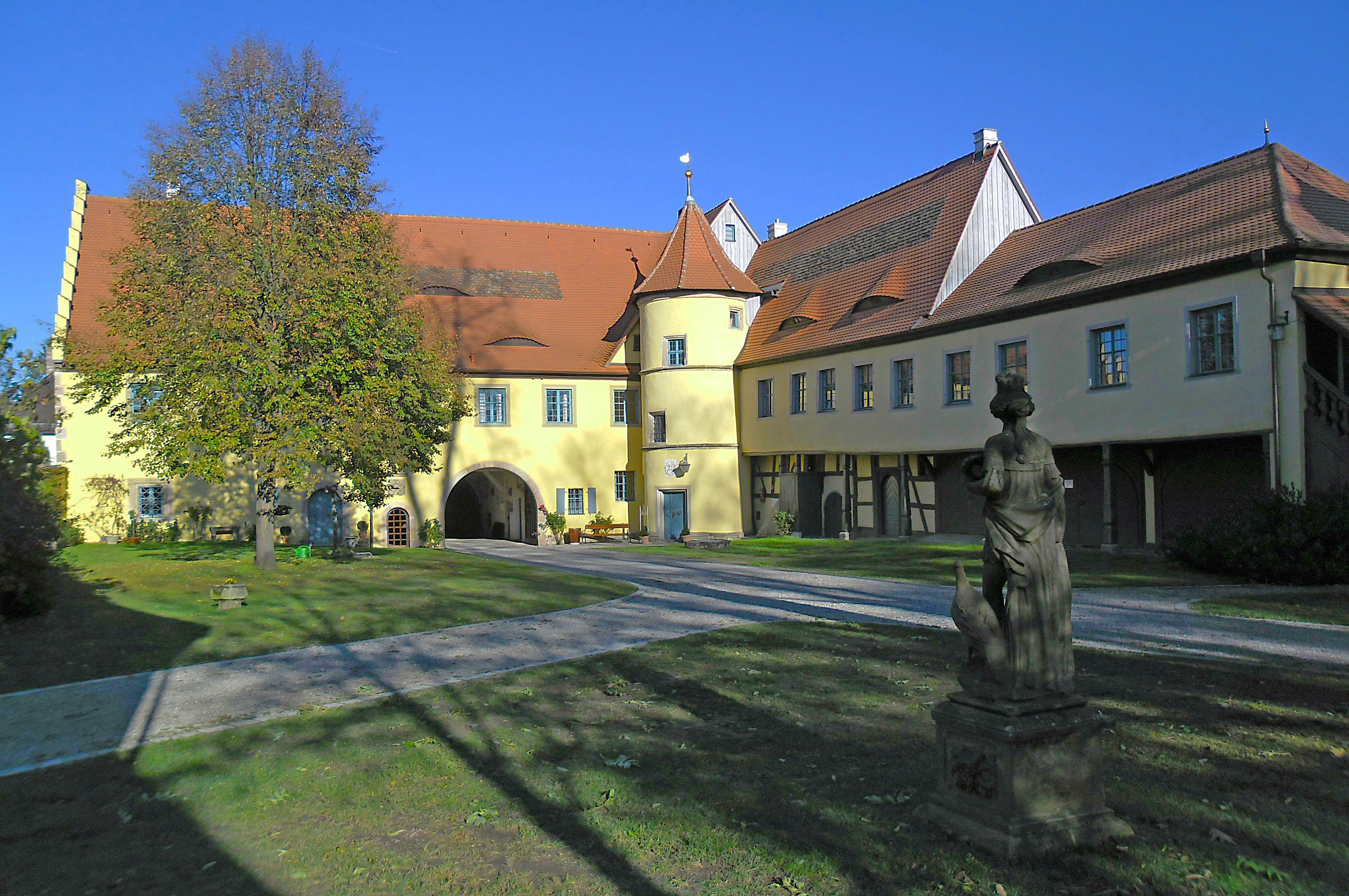 Innenhof des Adelsdorfer Schlosses mit rundem Treppenturm